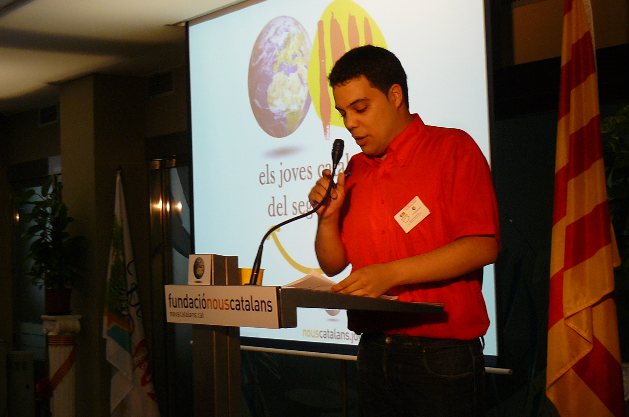 Èric Bertran en el segon congrés nacional de nous catalans joves